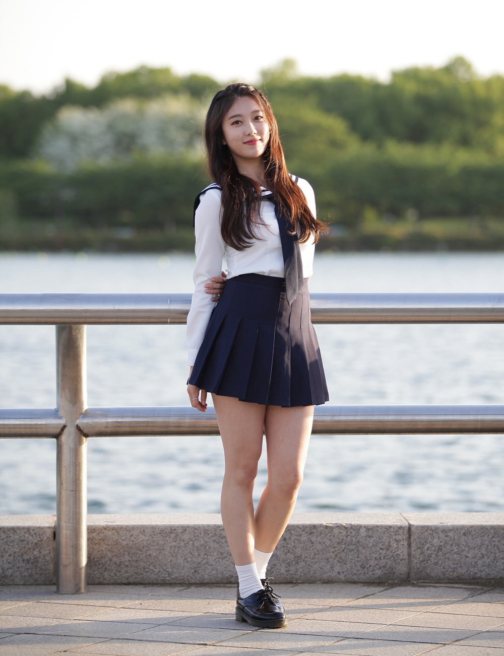 아이돌마스터.KR-꿈을 드림 (리얼걸 프로젝트(Real Girls Project) 일산 호수공원)